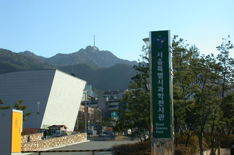 and Gwanak-san as background